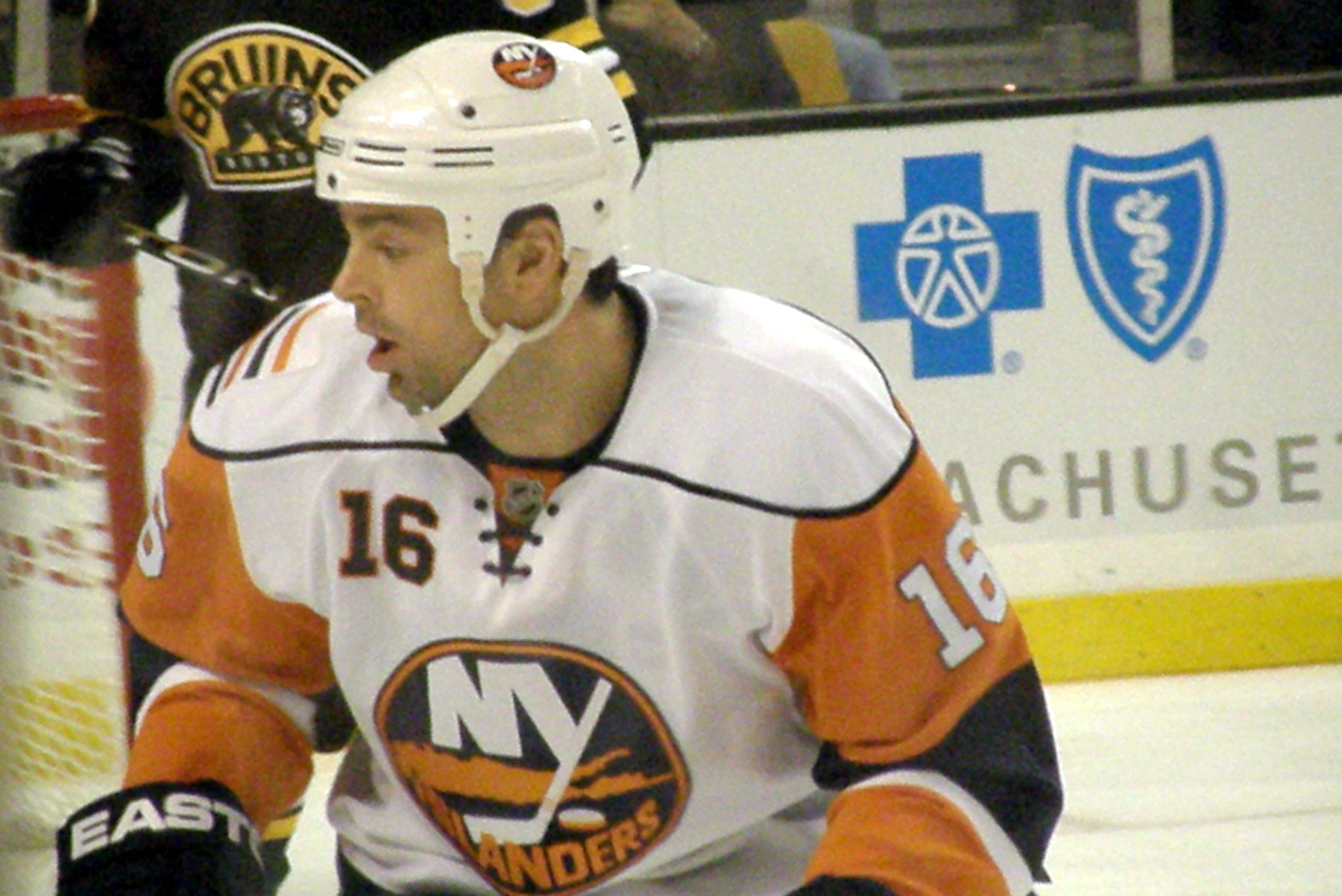 #16 Jon Sim